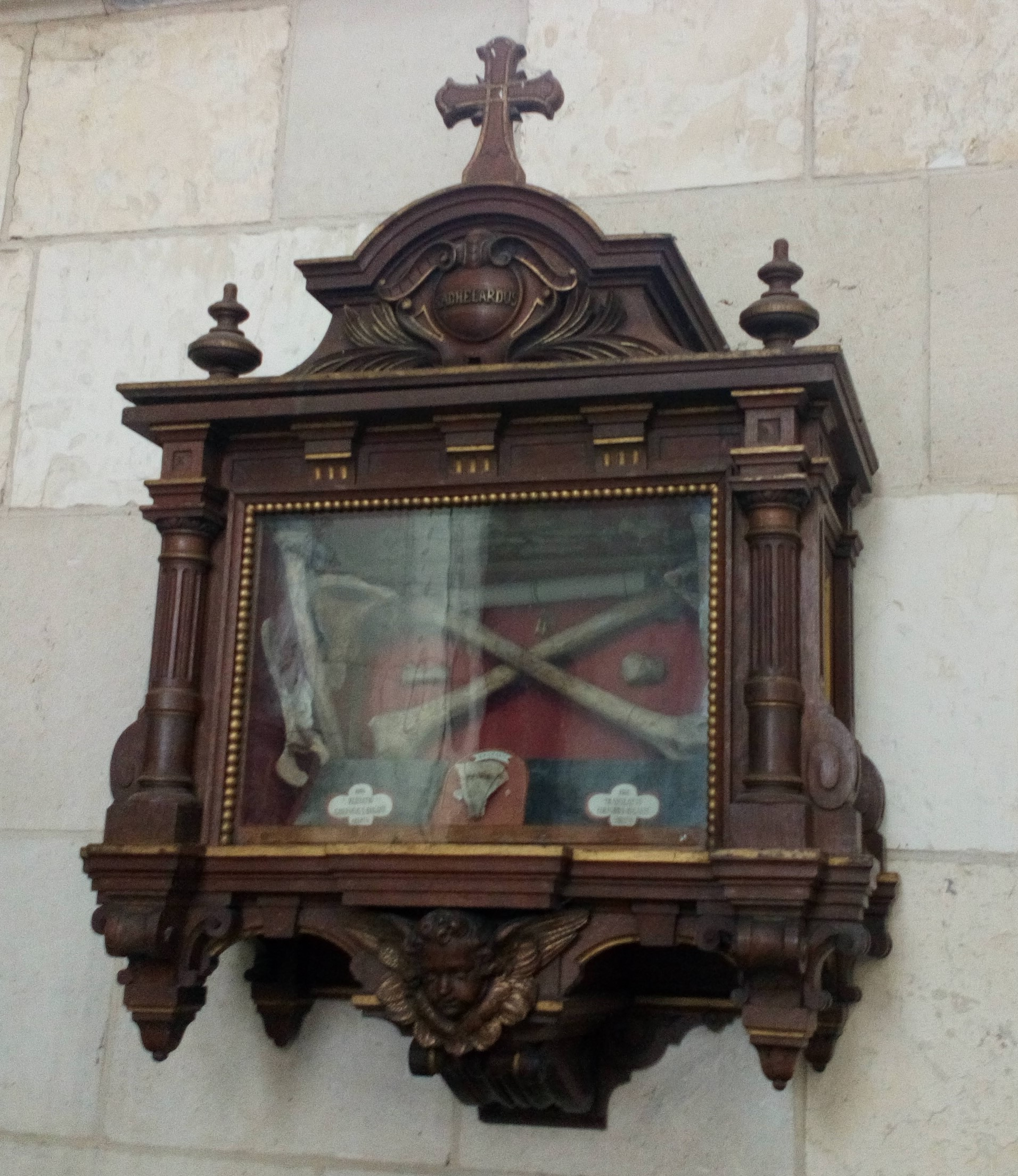 Abbatiale Saint-Pierre de Corbie intérieur, reliquaire 4